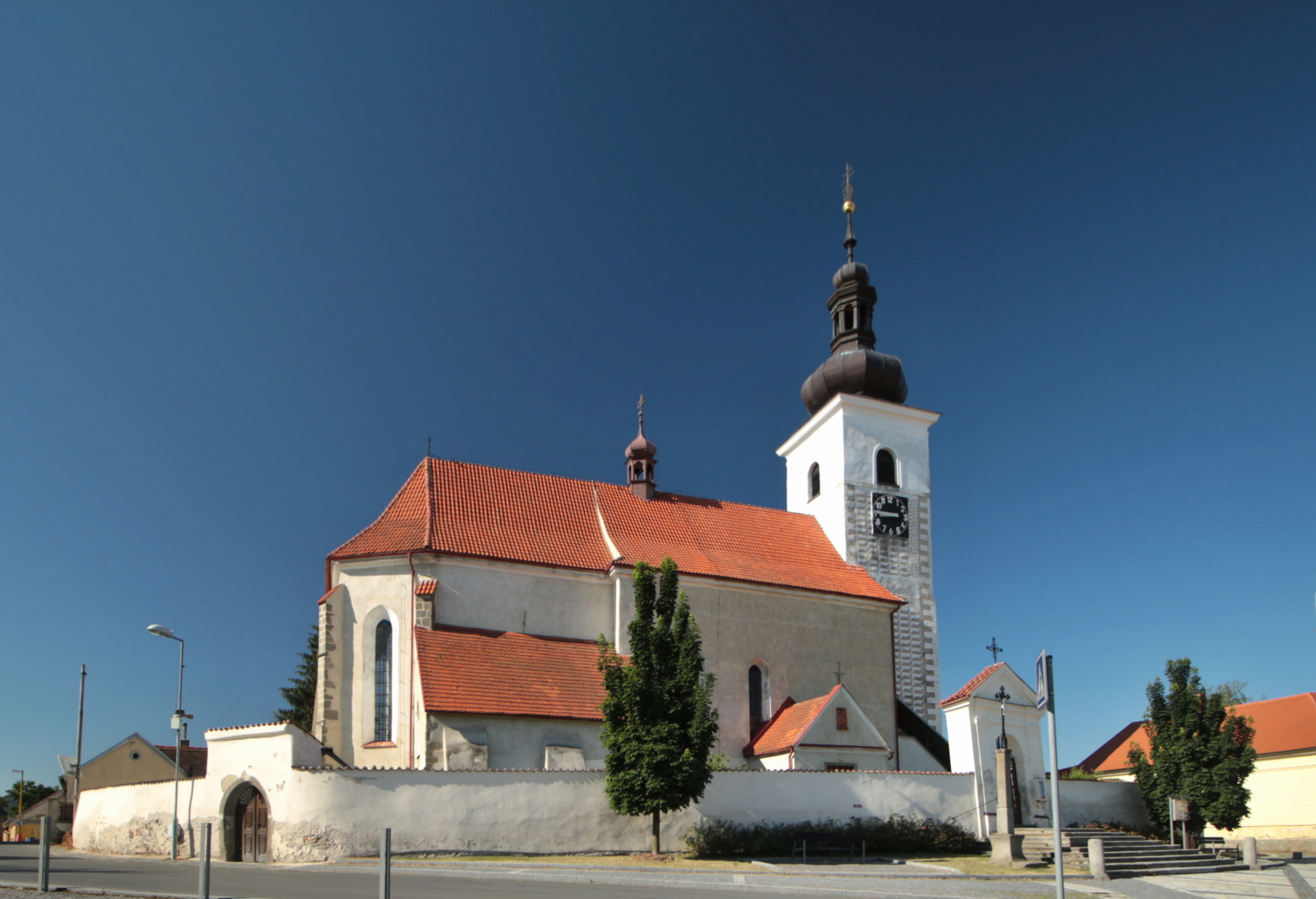 Sedlec-Prčice, kostel sv. Vavřince v Prčici